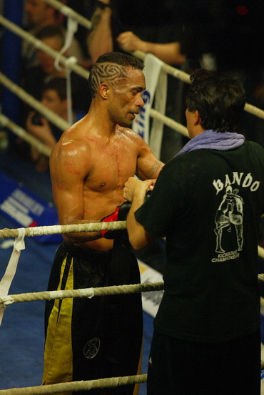 Marc Apelé avec son coach Jean-Roger Callière en 2006